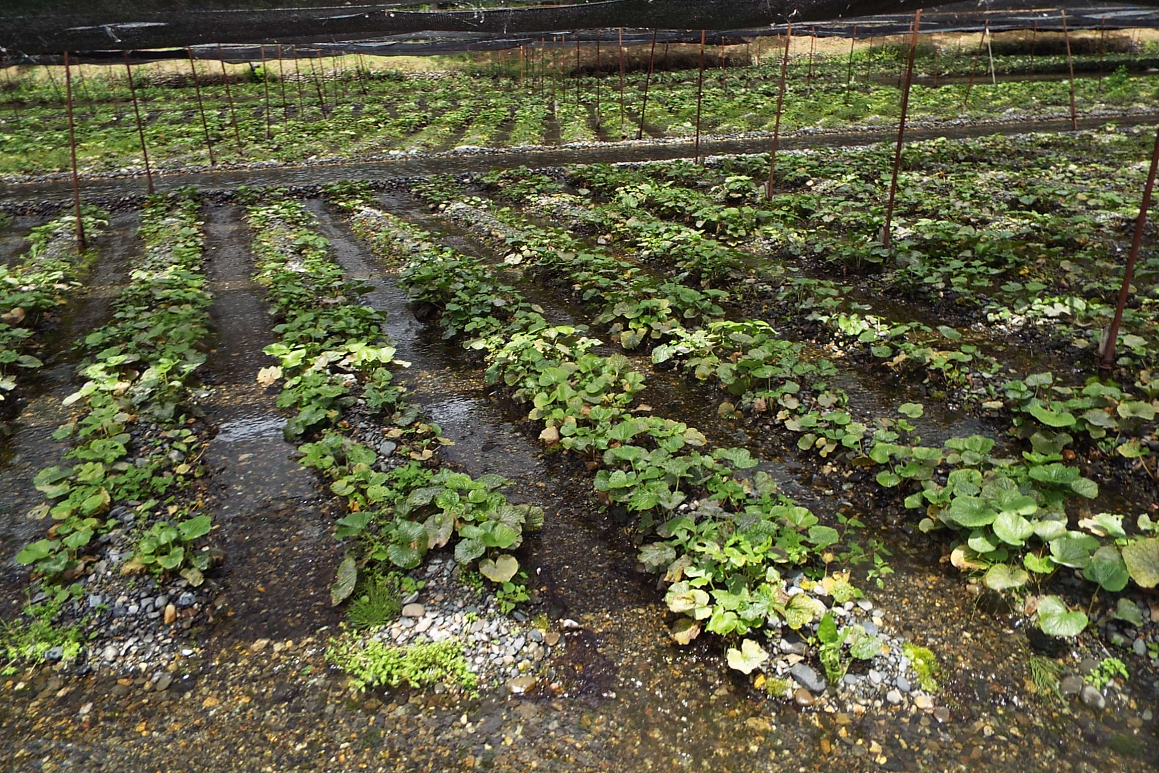 2016-07-03 Daio Wasabi Farm 大王わさび農園